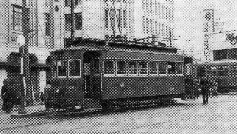 1940年ごろに撮影された広島瓦斯電軌（広島電鉄）の100(A)形電車129号。